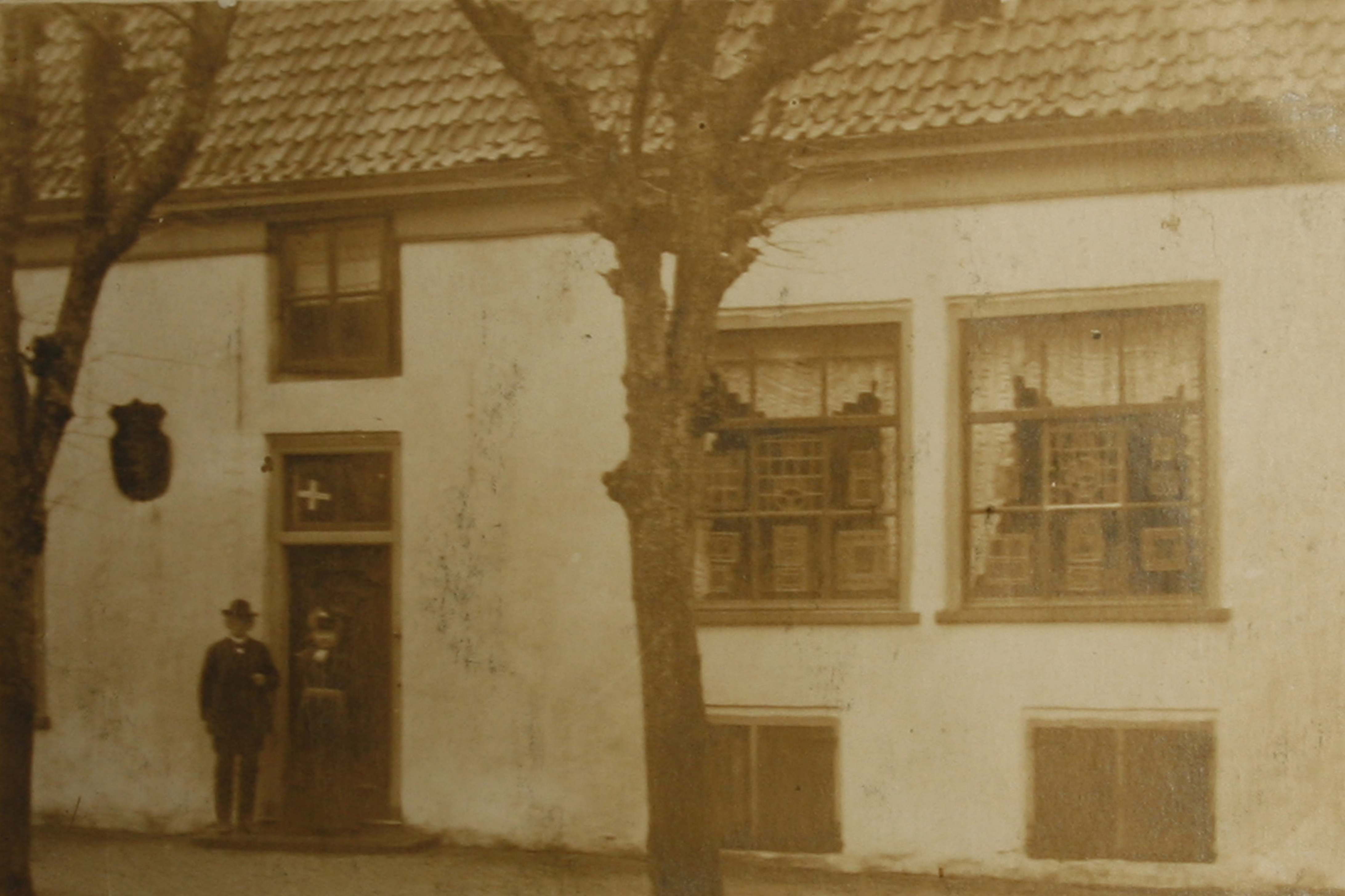 Tromp's Huys rond 1915